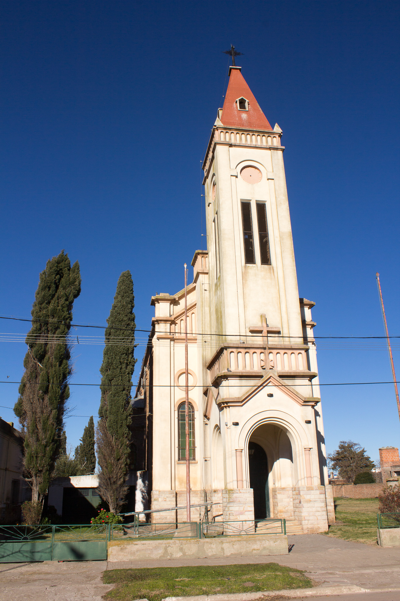 Foto tomada el 23 de mayo de 2018 desde el boulevard de calle San Martín.